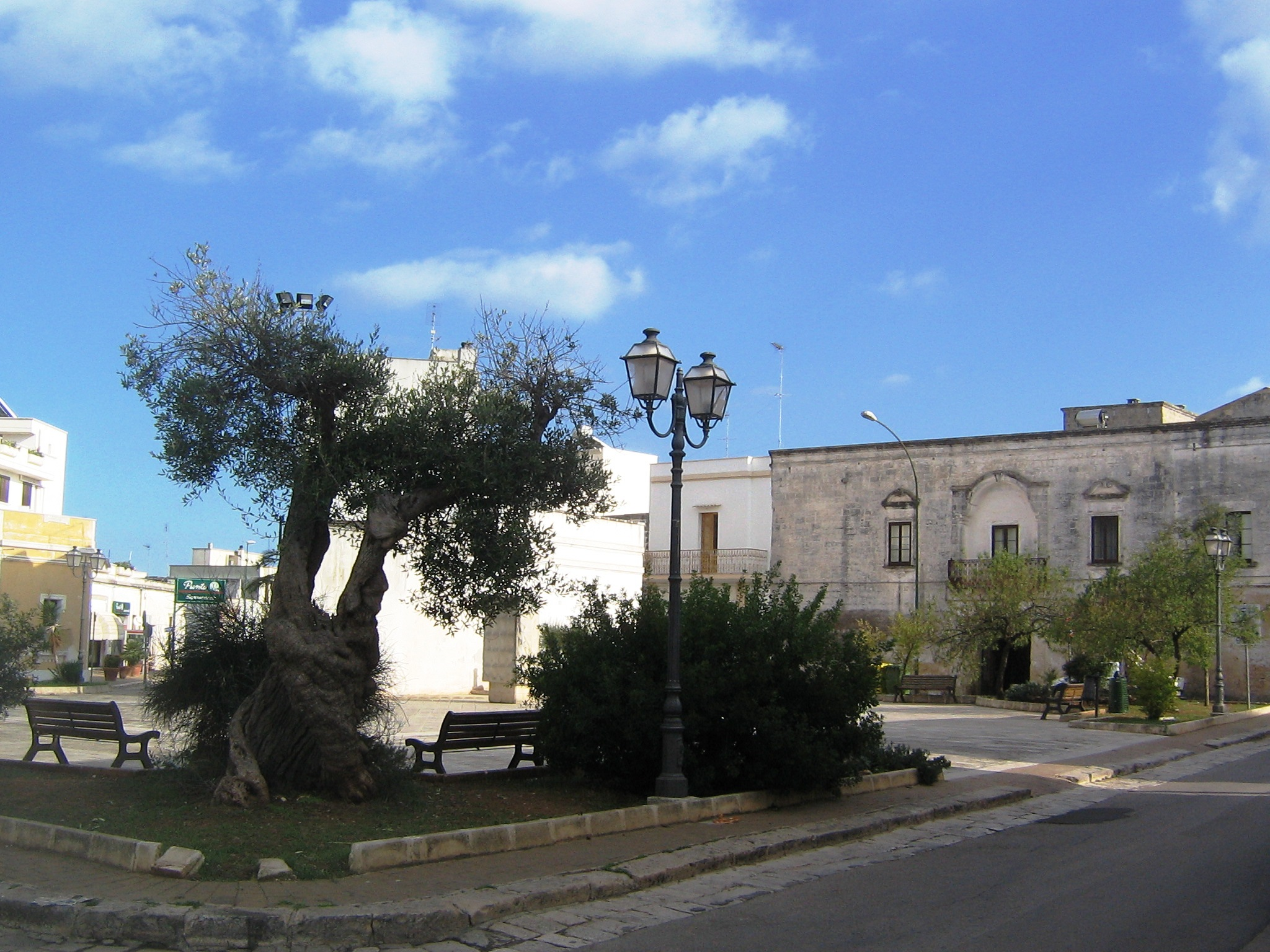 Castrignano del Capo Piazza del Mercato